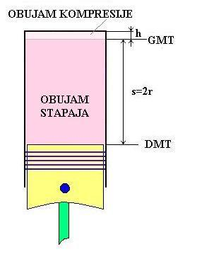 engine cylinder volumes